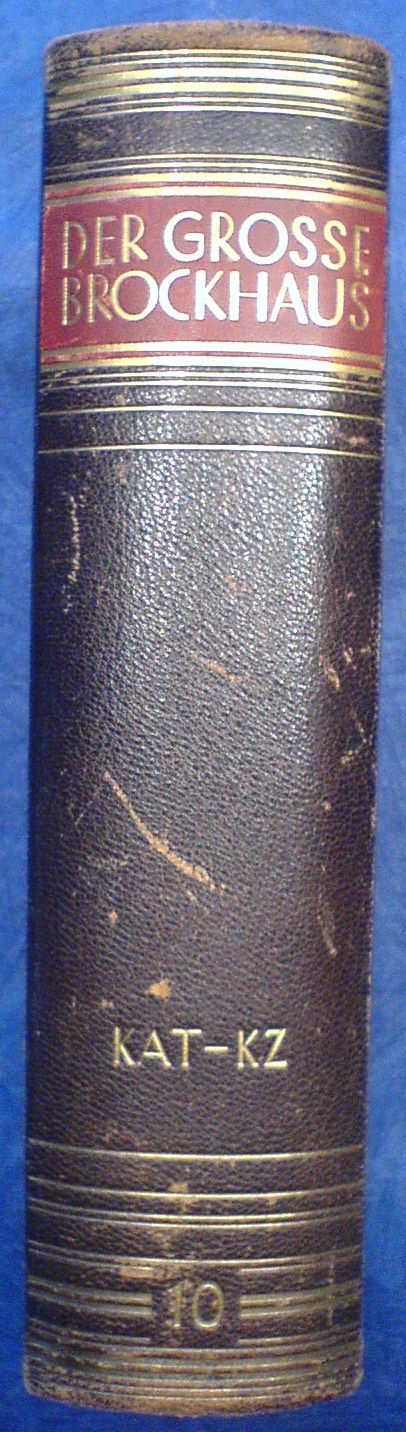 Einband des Bandes 10 der 15. Auflage des Brockhauses